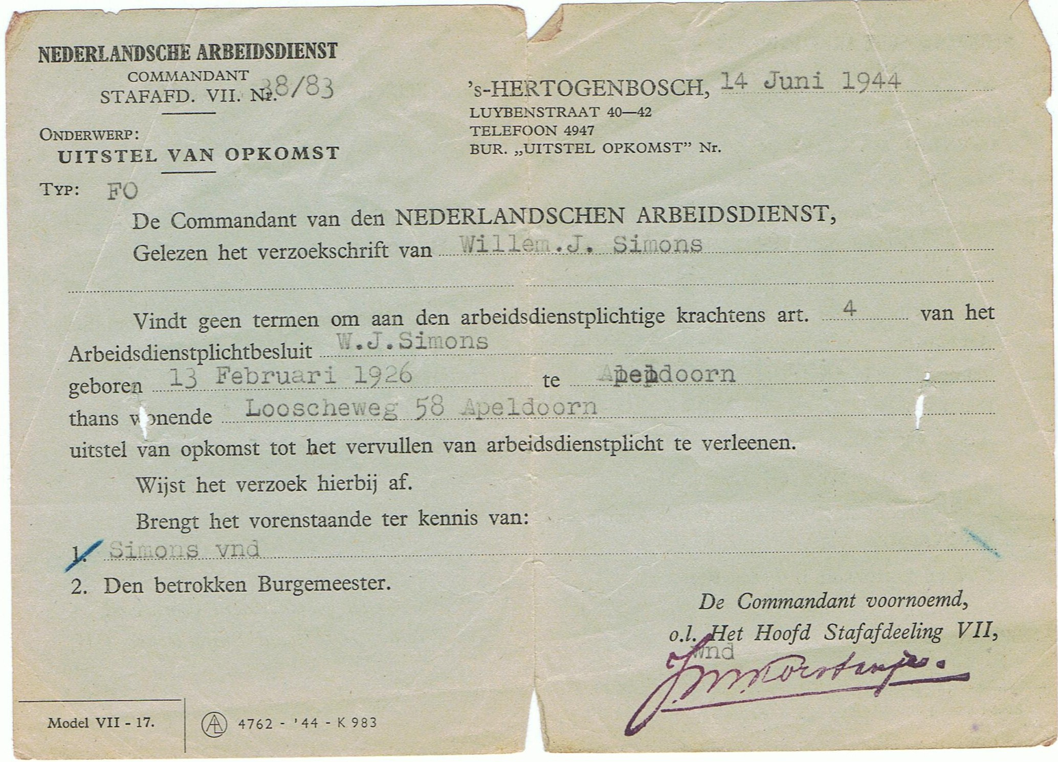 Afwijzing Arbeidsdienstplicht Simons